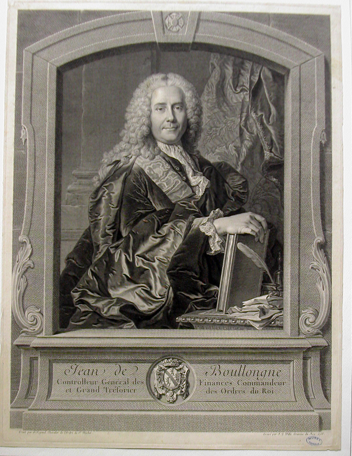 Portrait of Jean-Louis de Boullongne